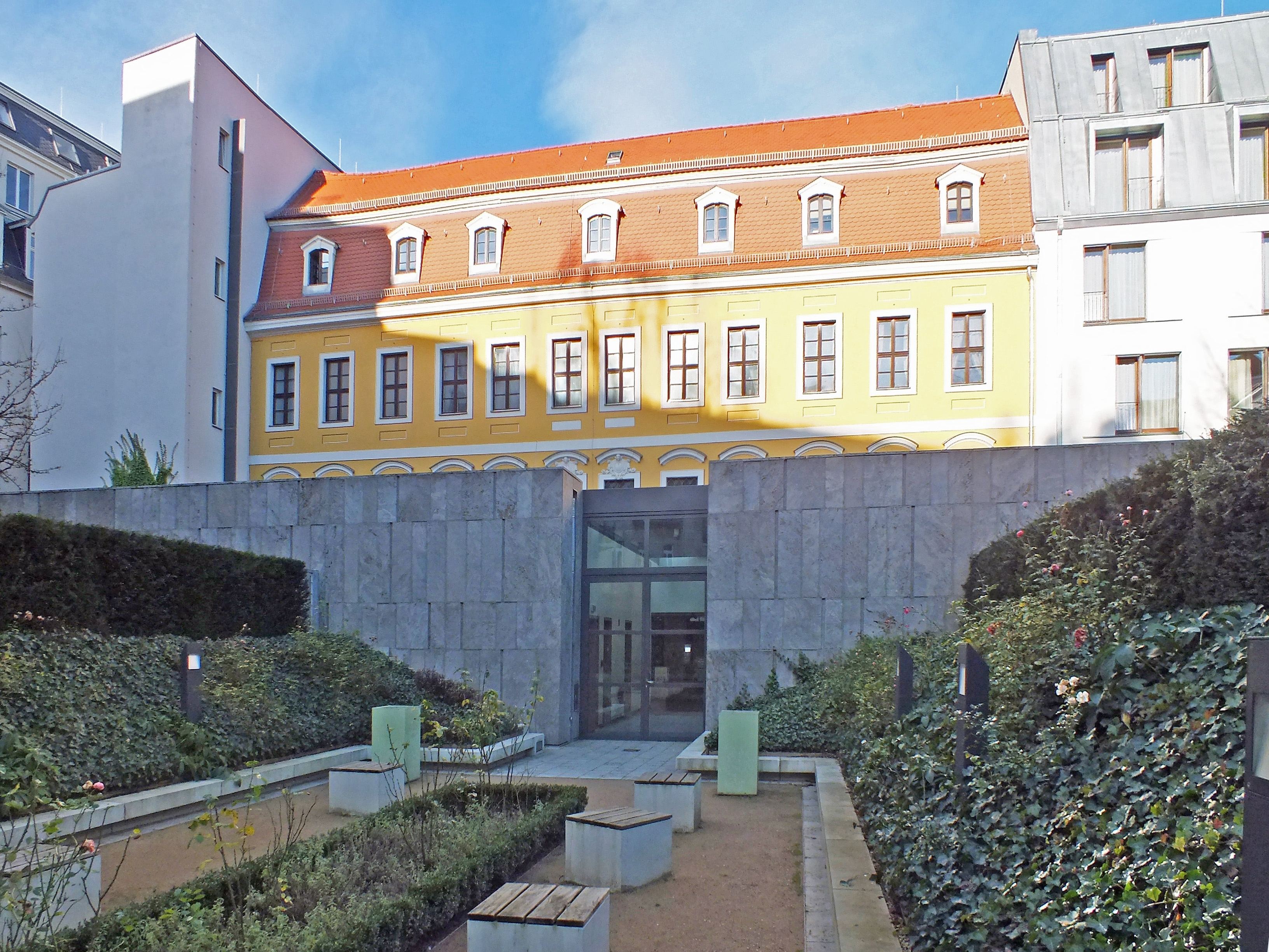 Südfront, Anbau und Garten des Bosehauses in Leipzig